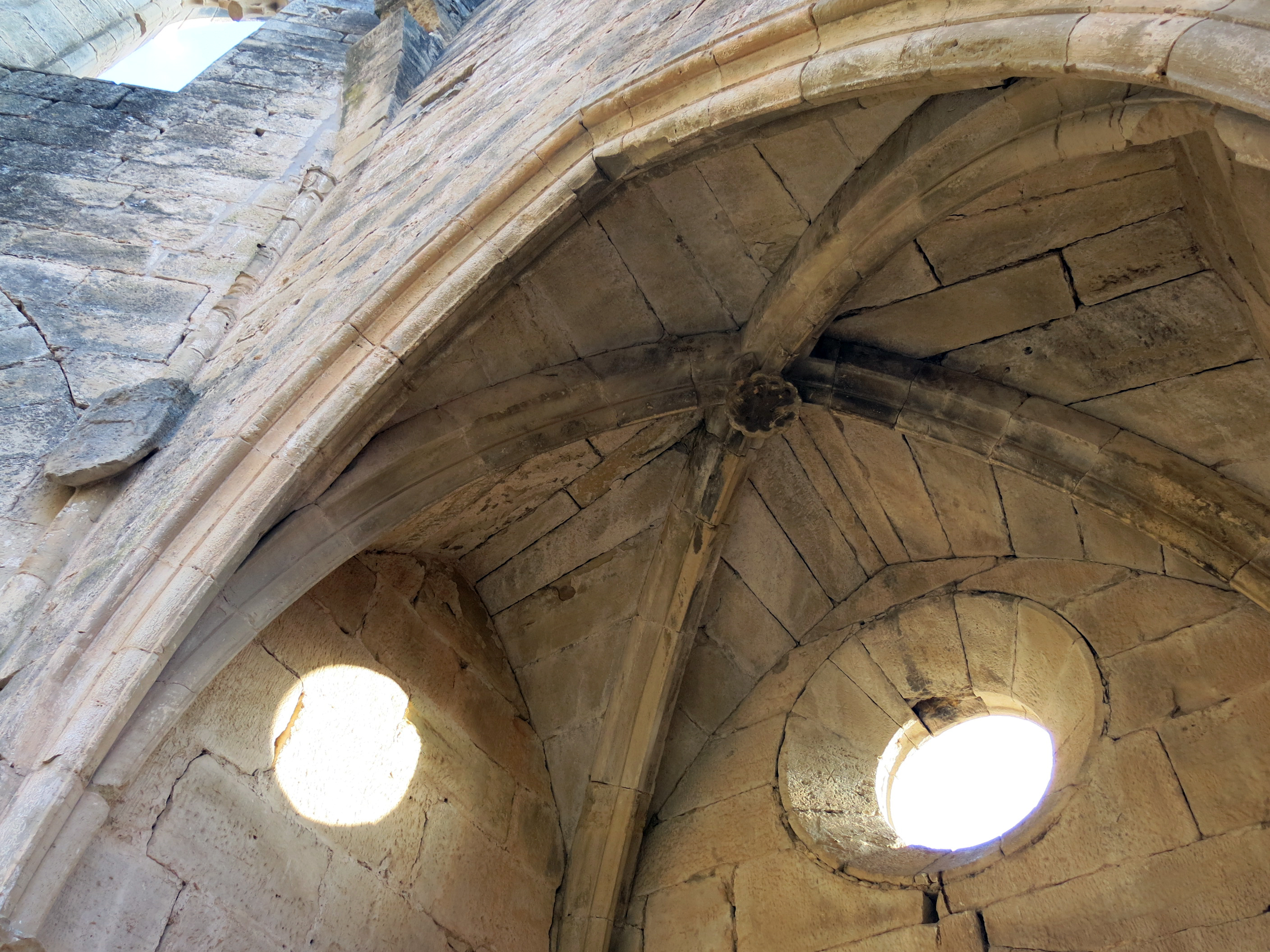 Restes del monestir de Vallsanta (Guimerà)